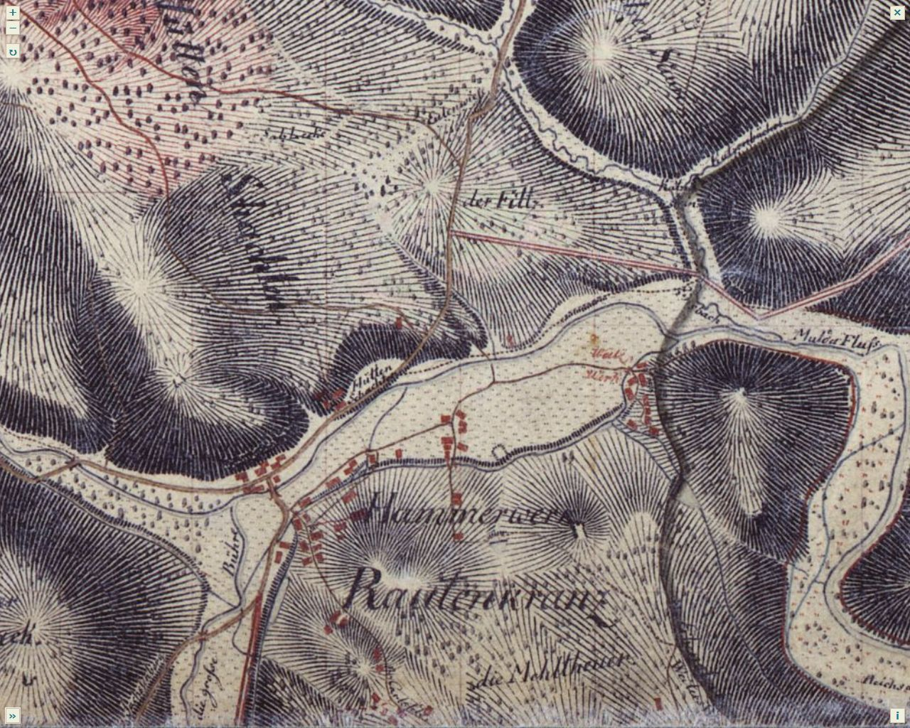 Rautenkranz: Ausschnitt aus Blatt 184 – Schnarrtanne - der Sächsischen Meilenblätter – Freiberger Exemplar von 1791 mit Nachträgen bis 1876. Mündung der Großen Pyra in die Zwickauer Mulde Hinweis: Karte ist nicht genordet. Link zur Karte in der Staats- und Universitätsbibliothek Dresden